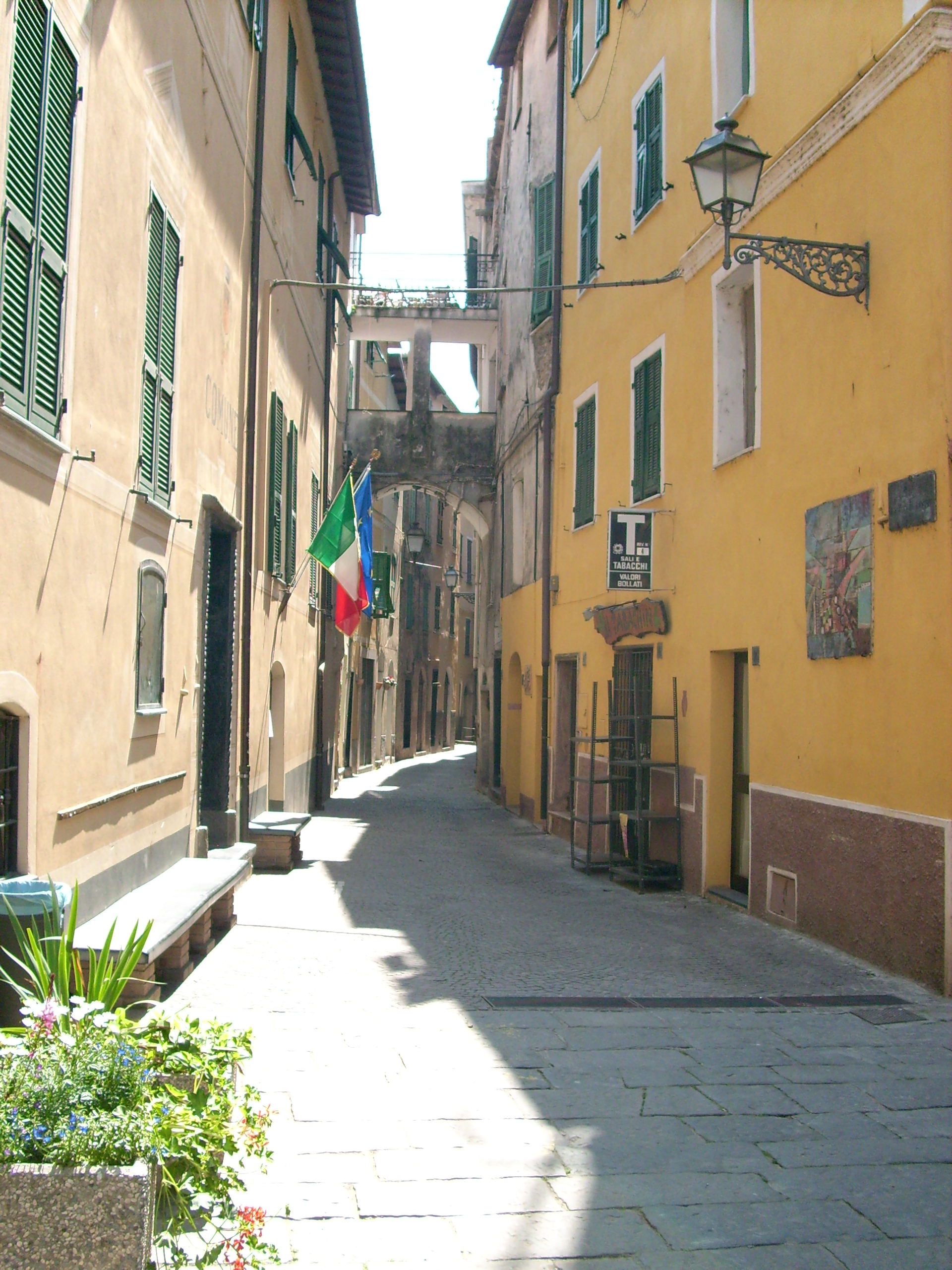 Badalucco, Liguria, Italia